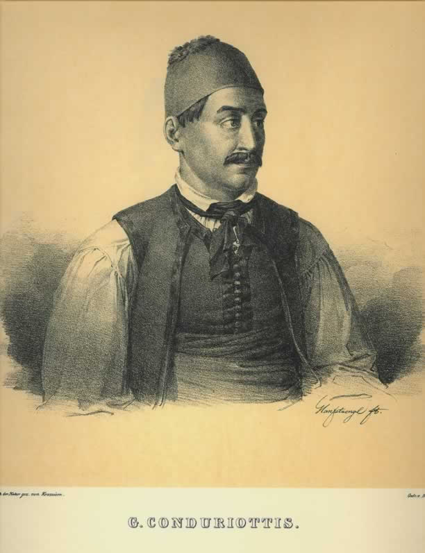 Aπό: Bildnisse ausgezeichneter Griechen und Philhellenen nebst einigen Ansichten und Trachten. Nach der Natur gezeichnet und herausgegeben von Karl Krazeisen. Munchen 1831